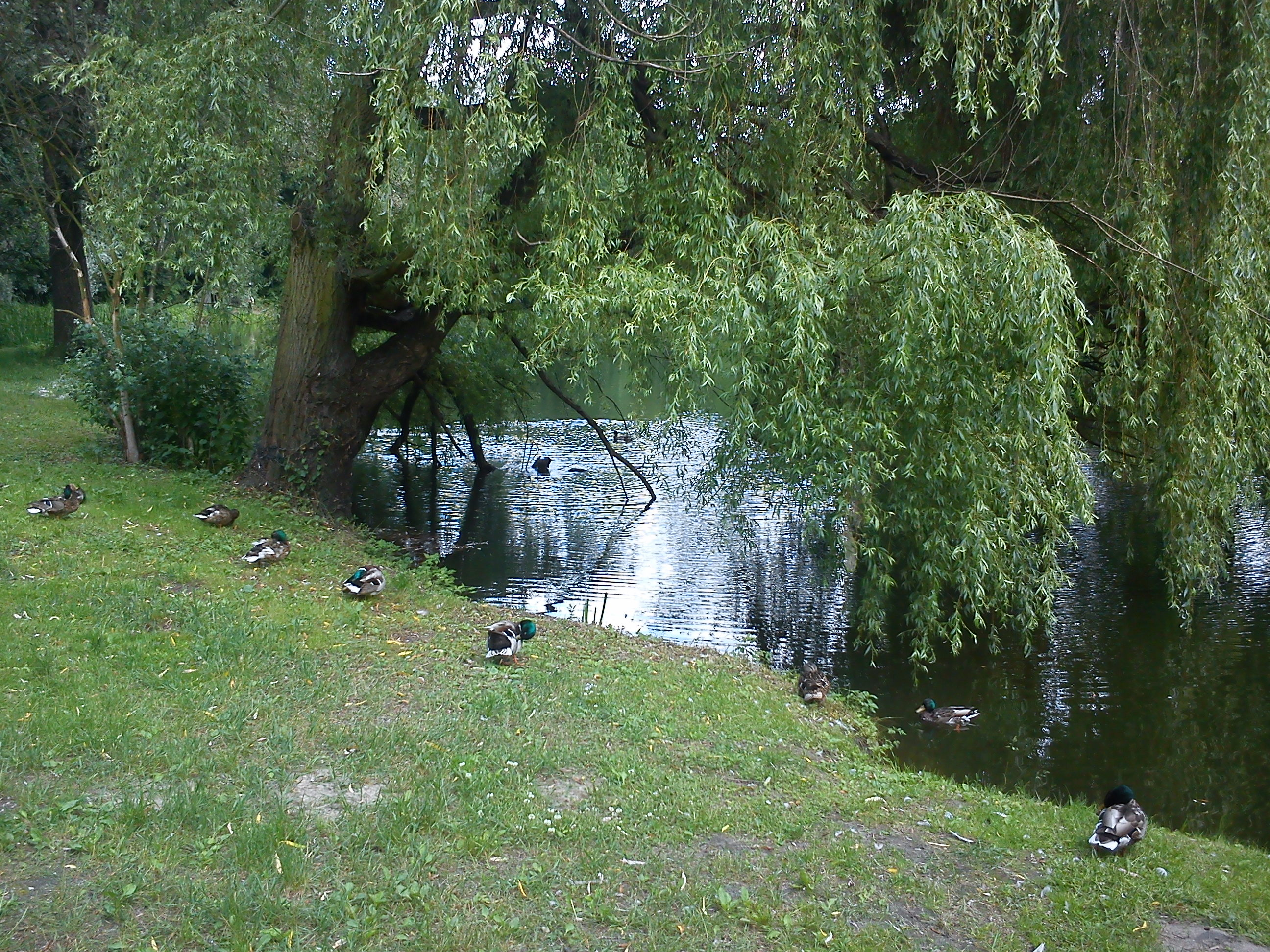 Park Dębina - Poznań.